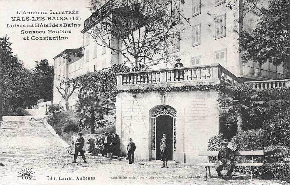 Vals-les-Bains (Ardèche, France), source Pauline et Constantine, Grand Hôtel des Bains.